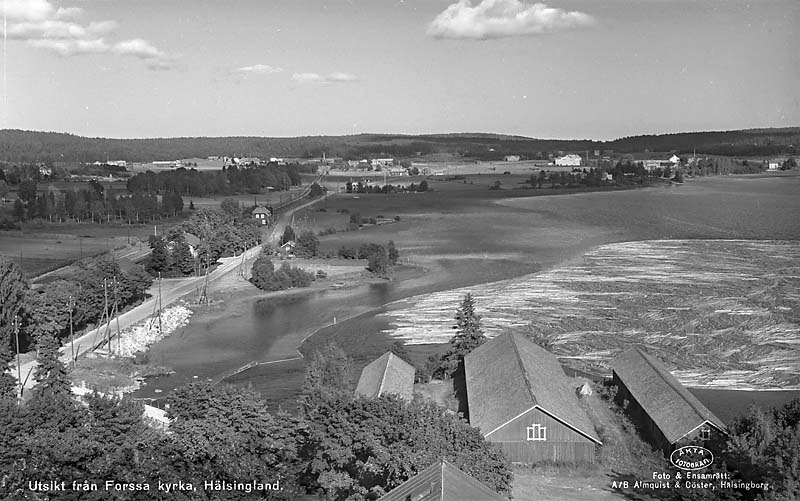 Utsikt från Forsa kyrka. Motiv: Forsa Nyckelord: Riksintressen Kategori: Insjömiljöer Utsikt från Forsa kyrka.